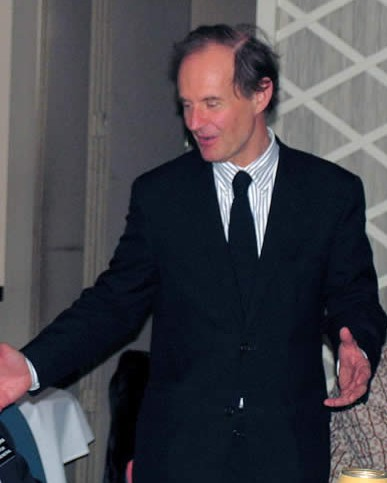 David Boies David Boies.jpg is